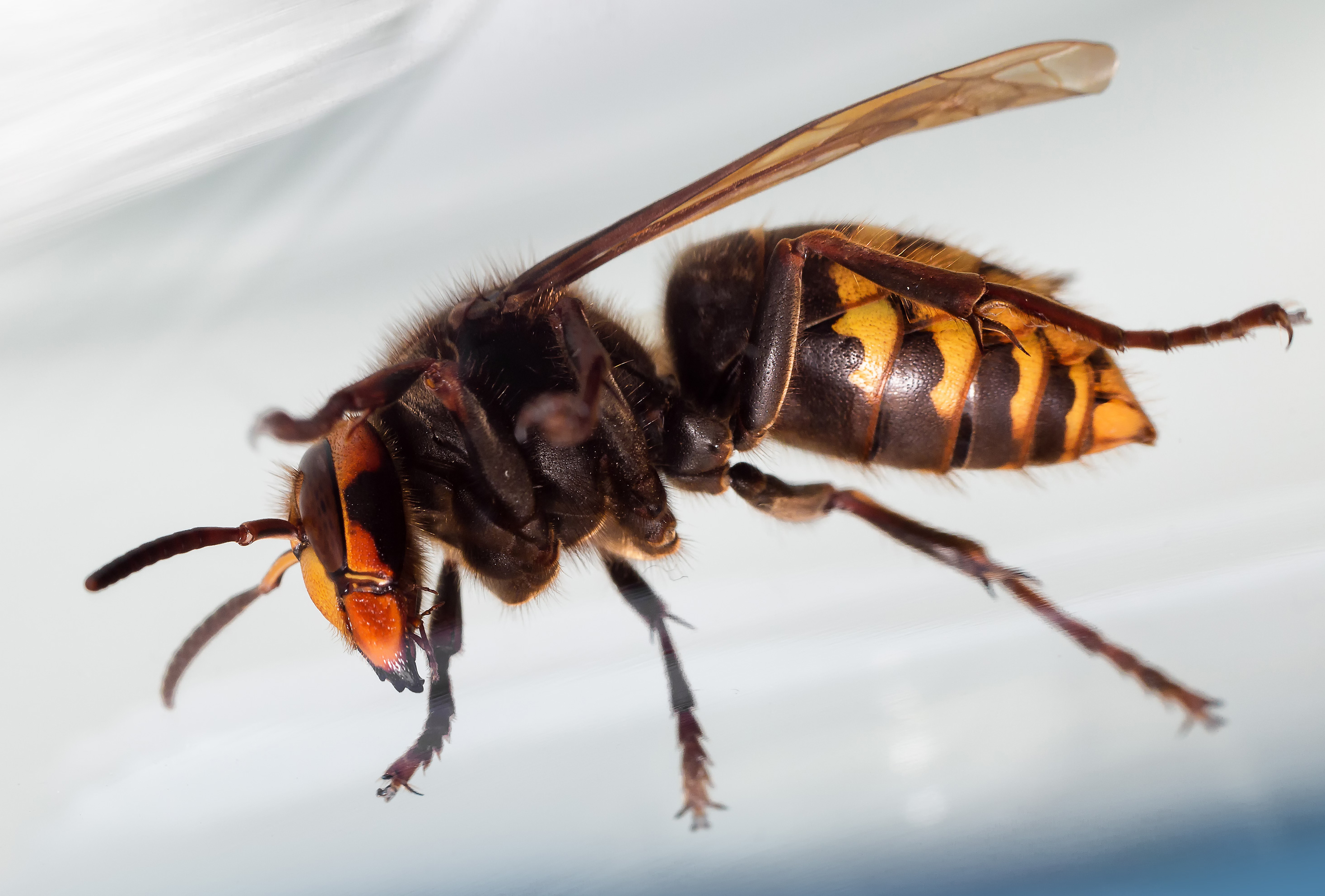 Молодой шершень в поисках пищи, весна 2016, Новосибирск.